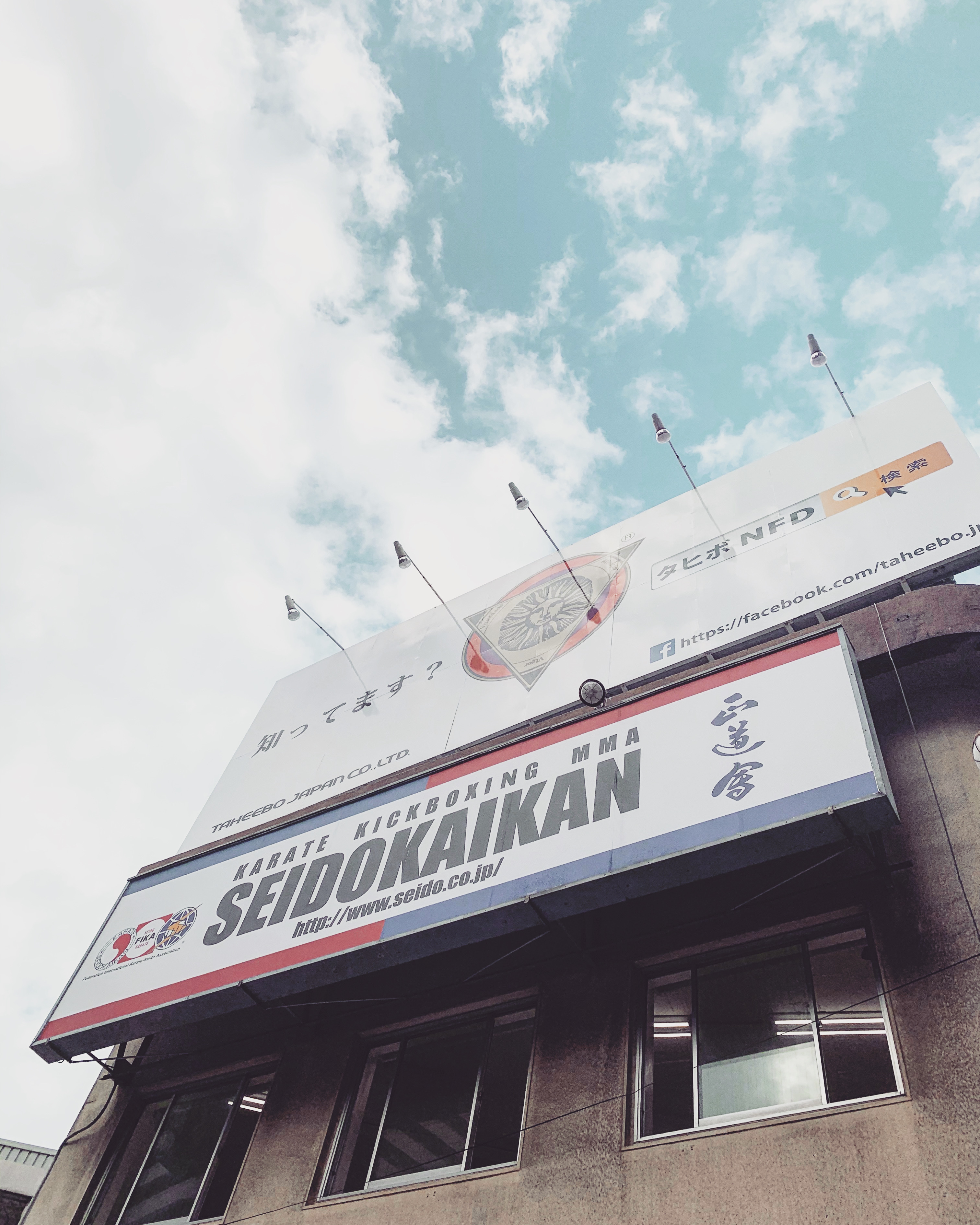 正道会館総本部の外観